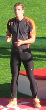 Otto Kilpi Kalevan kisoissa, Ratinan stadionilla, Tampereella, 26. heinäkuuta 2008